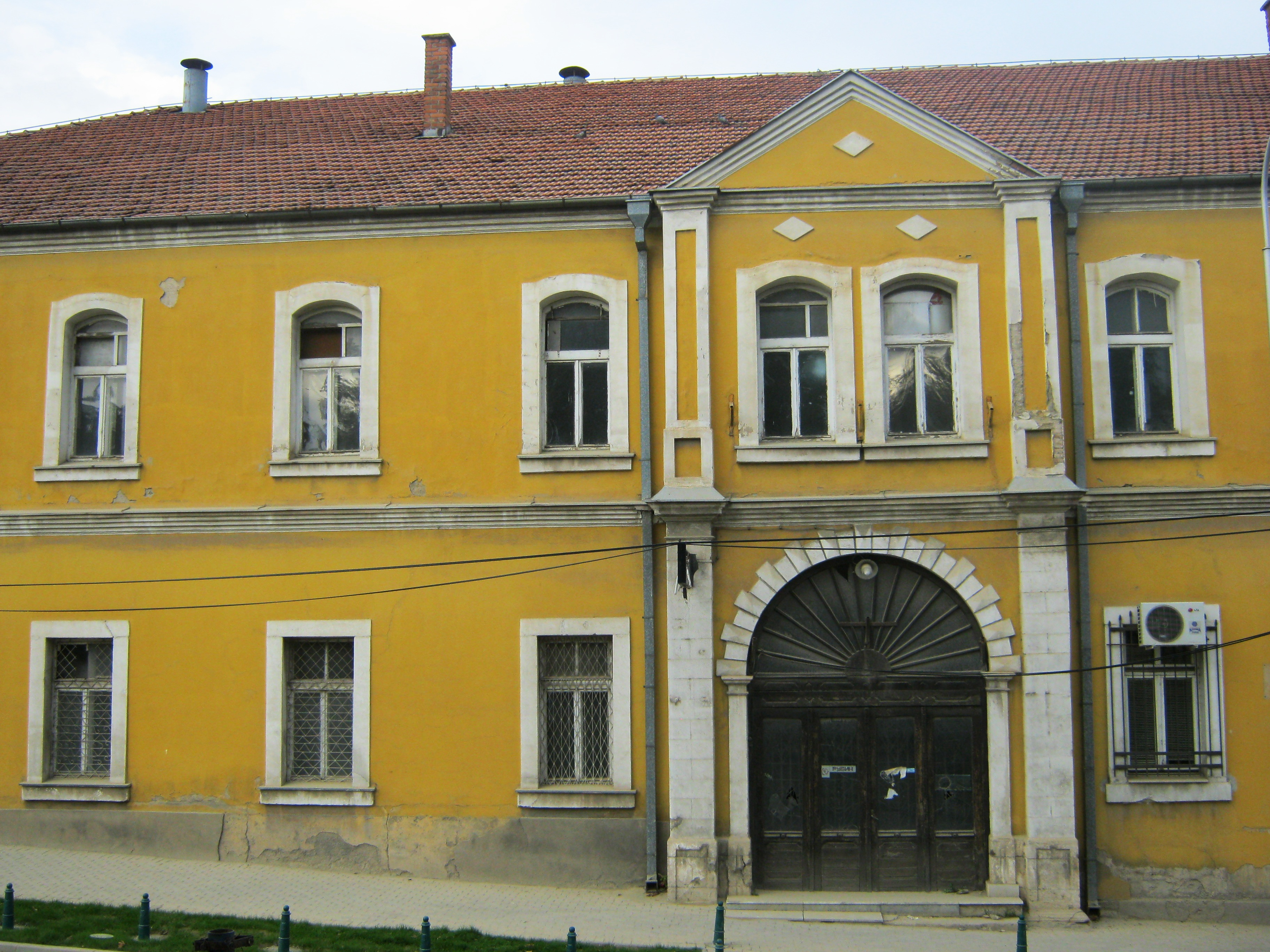 Зграда на Вилаетскиот конак „Уќумат“ во Скопје